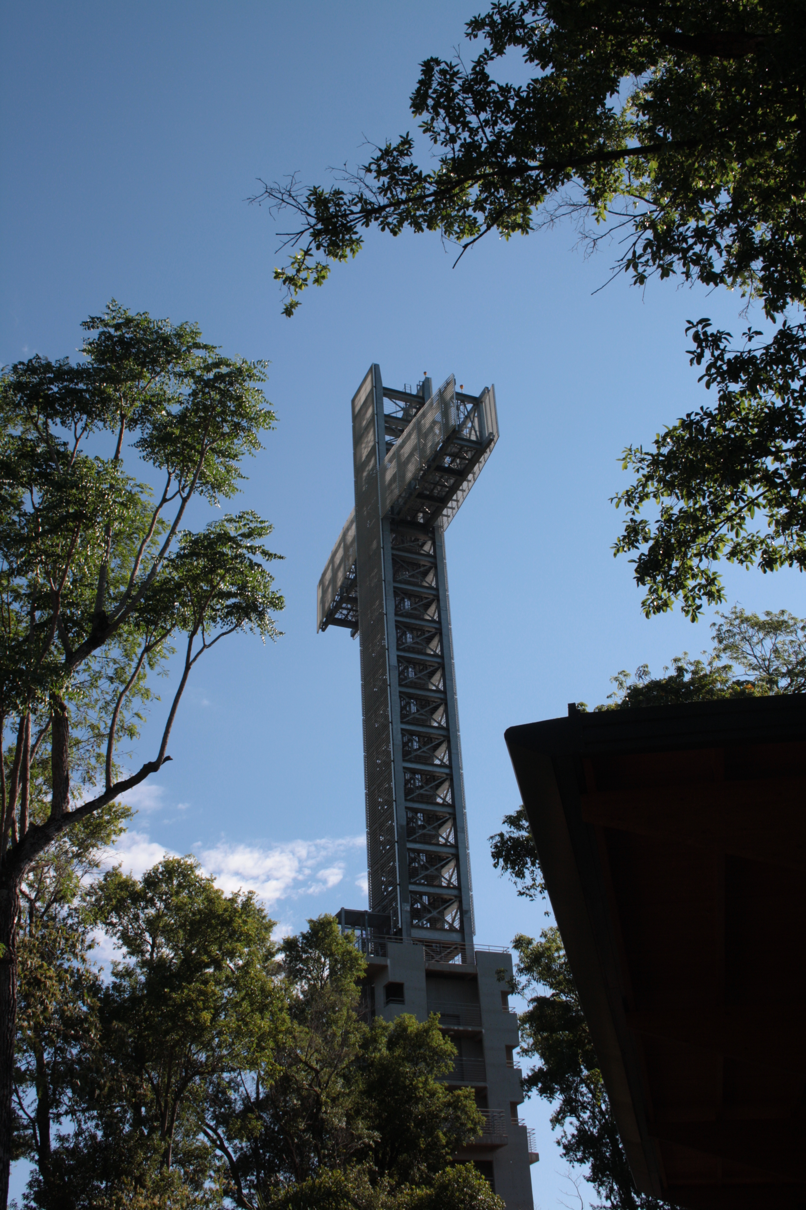 Cruz de Santa Ana